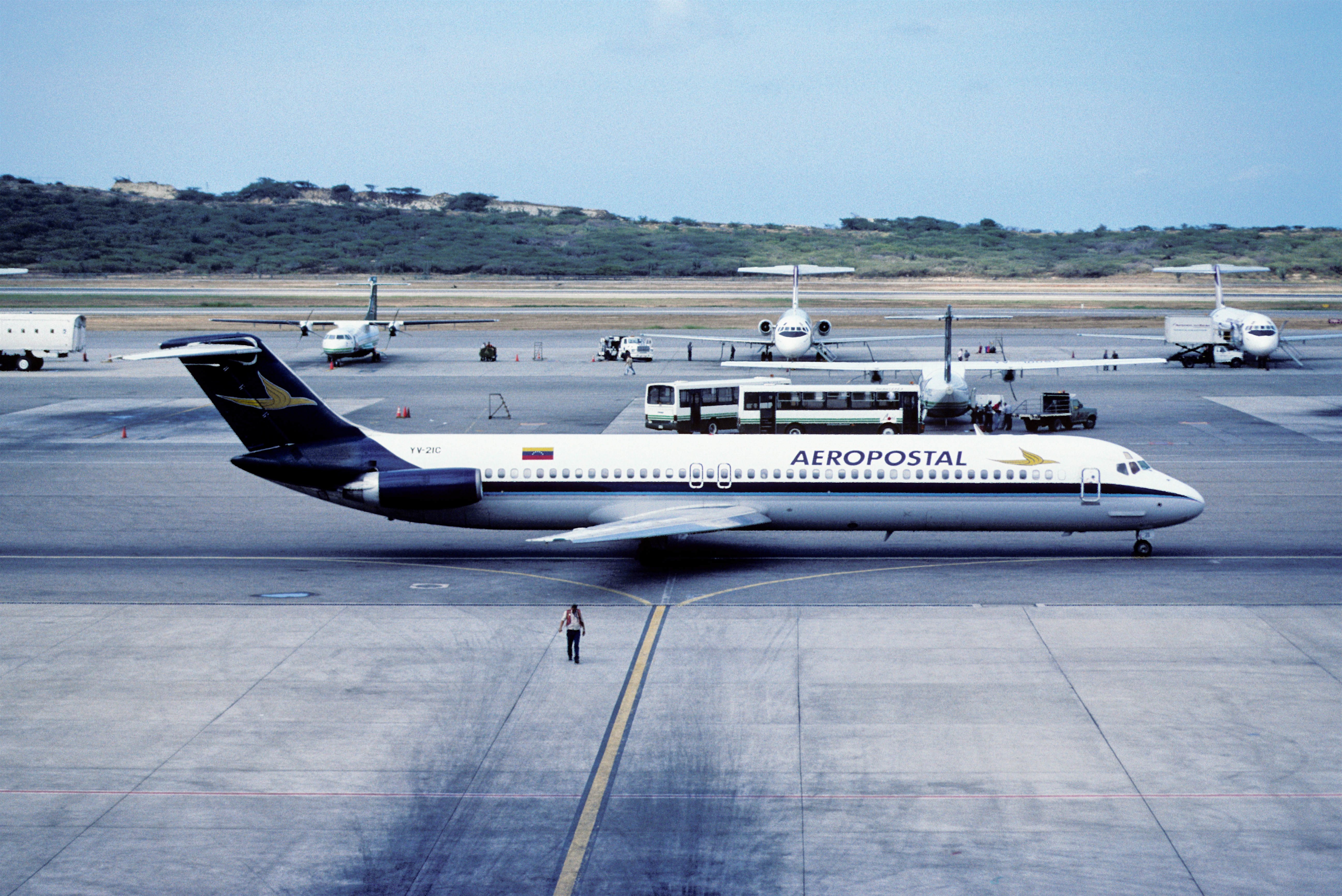 155aw - Aeropostal DC-9-51; YV-21C@CCS;19.10.2001